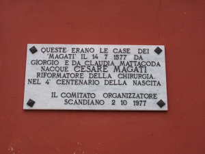 Targa in ricordo di Magati, presente sulla sua casa ancora visibile oggi a Scandiano